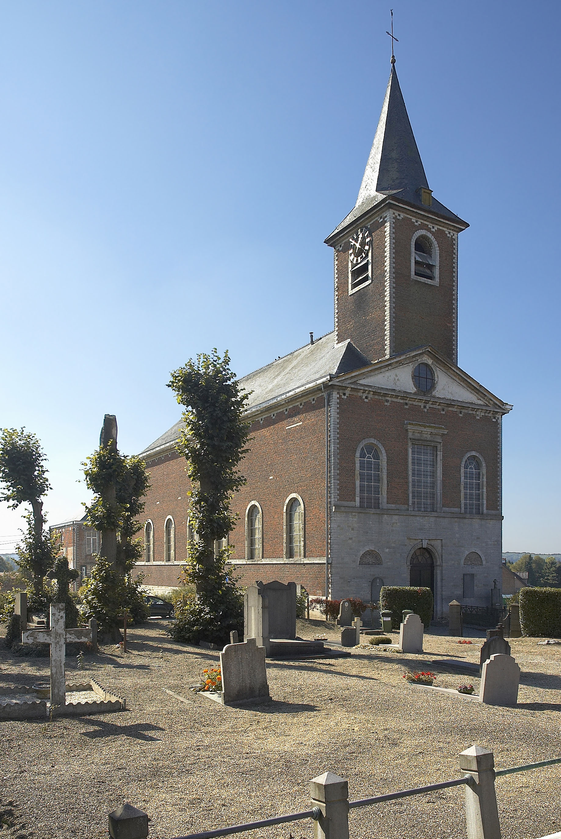 Sint-Jan-Evangelistkerk en begraafplaats